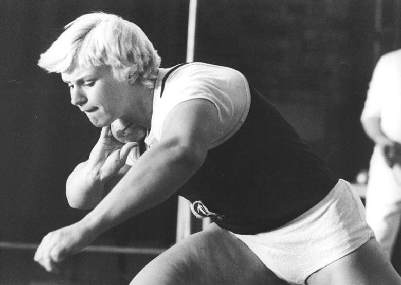 Ilona Slupianek ADN-ZB Mittelstädt 24.01.1980 Berlin: Ilona Slupianek stieß 21,52 m-Auf ausgezeichnete 21,52 m kam Kugelstoß-Europameisterin Ilona Slupianek am 23.01.1980 bei einem Hallen-Sportfest in der Hauptstadt. Die Berliner Dynamo-Sportlerin verfehlte damit ihre eigens DDR-Hallen-Bestleistung nur um sieben Zentimeter. Foto von einem früheren Wettkampf.